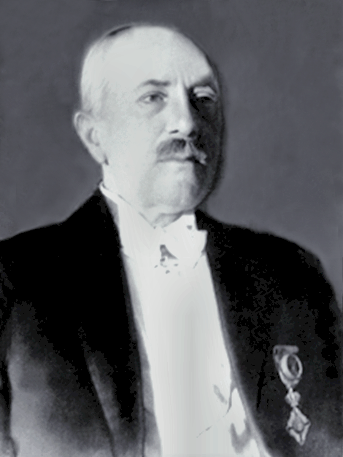 Sever Zotta, Director al Arhivelor Statului Iaşi în perioada 1912-1934.